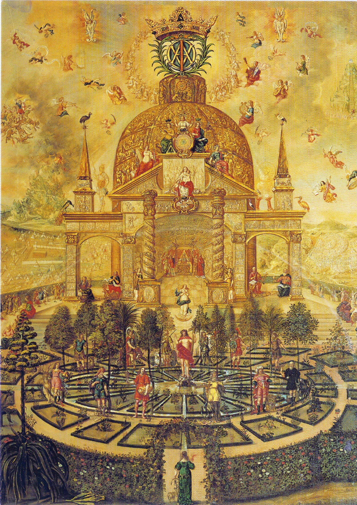 Hauptbild der Bad Teinacher kabbalistischen Lehrtafel